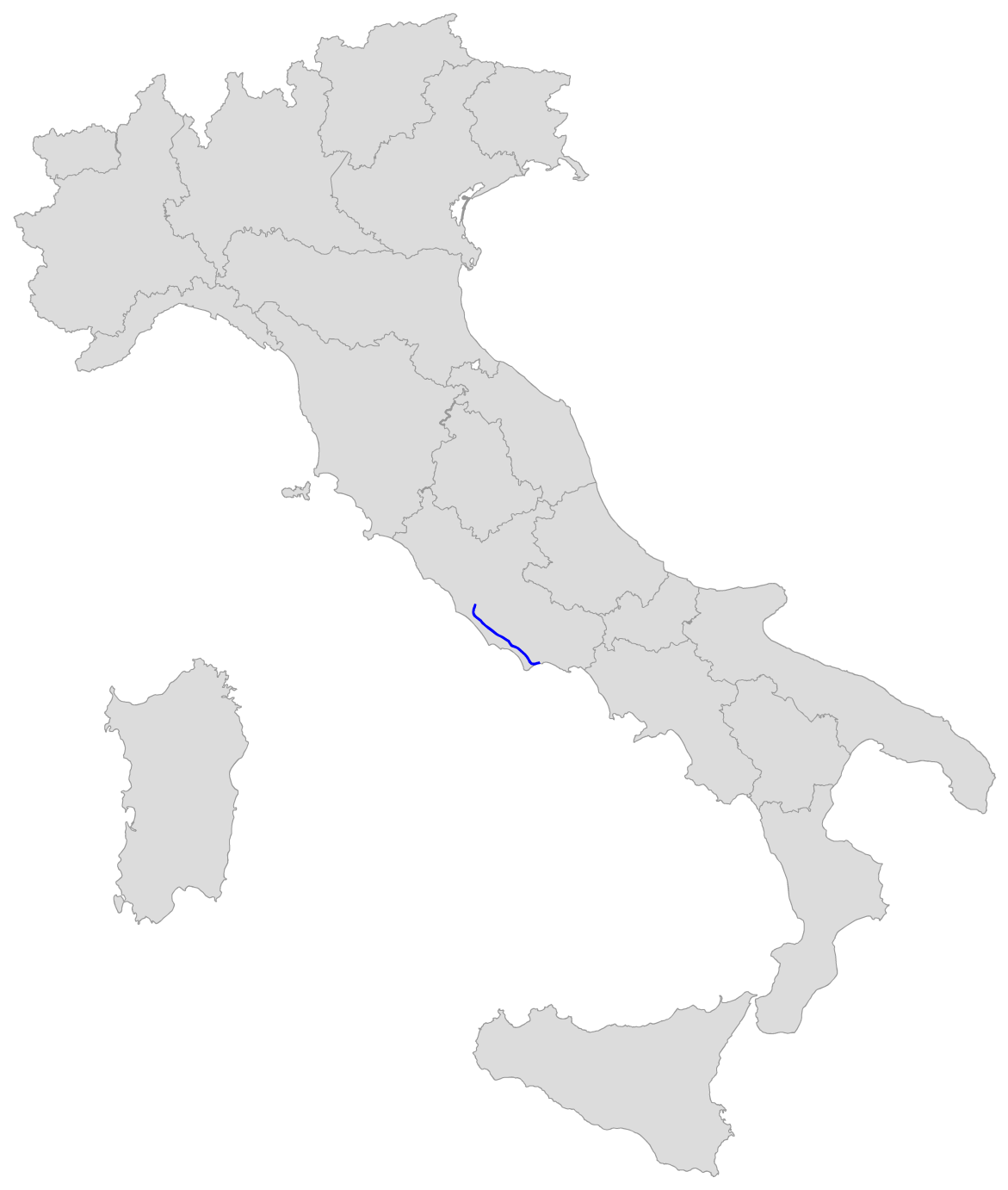 Percorso della SS 148 Pontina